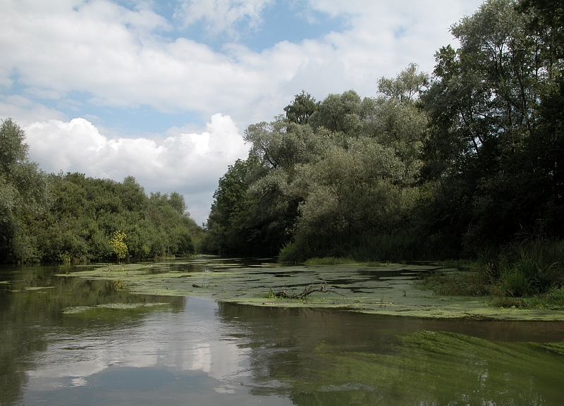 Taubergießen, Deutschland, Germany